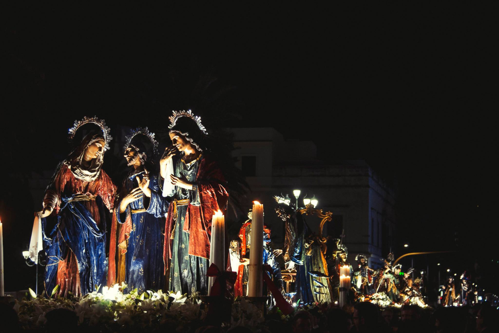 i 20 gruppi dei Misteri di Trapani in sosta ,prima di riprendere il regolare svolgimento della processione